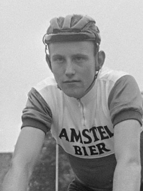 Kampioenschap Ploegentijdrit 1968 te Hoofddorp. 31 juli 1968